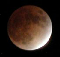 我在2003年11月8日晚上8時58分，於密歇根州大急流市以Nikon E5700拍攝月蝕。